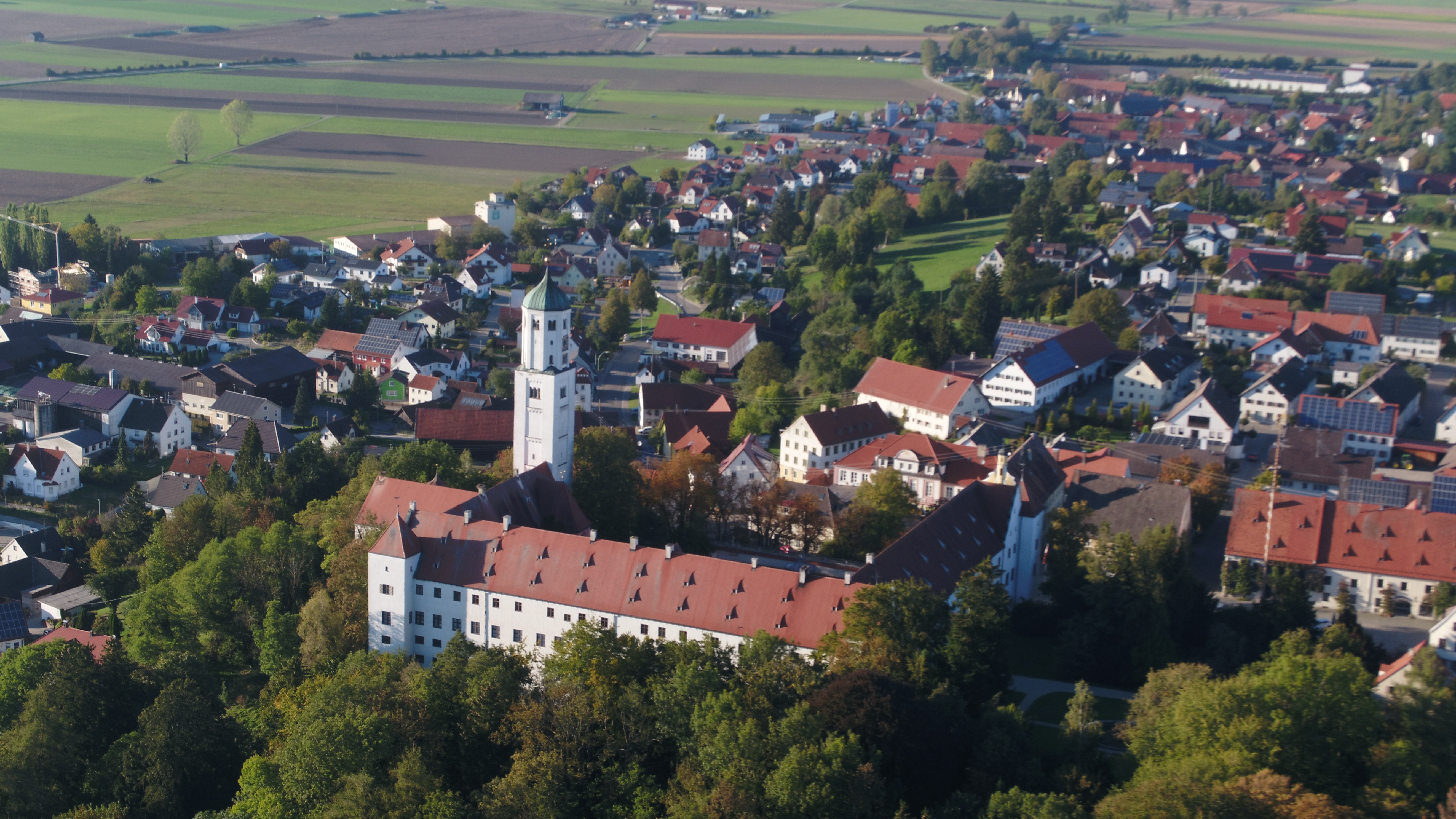 Kirchheim in Schwaben